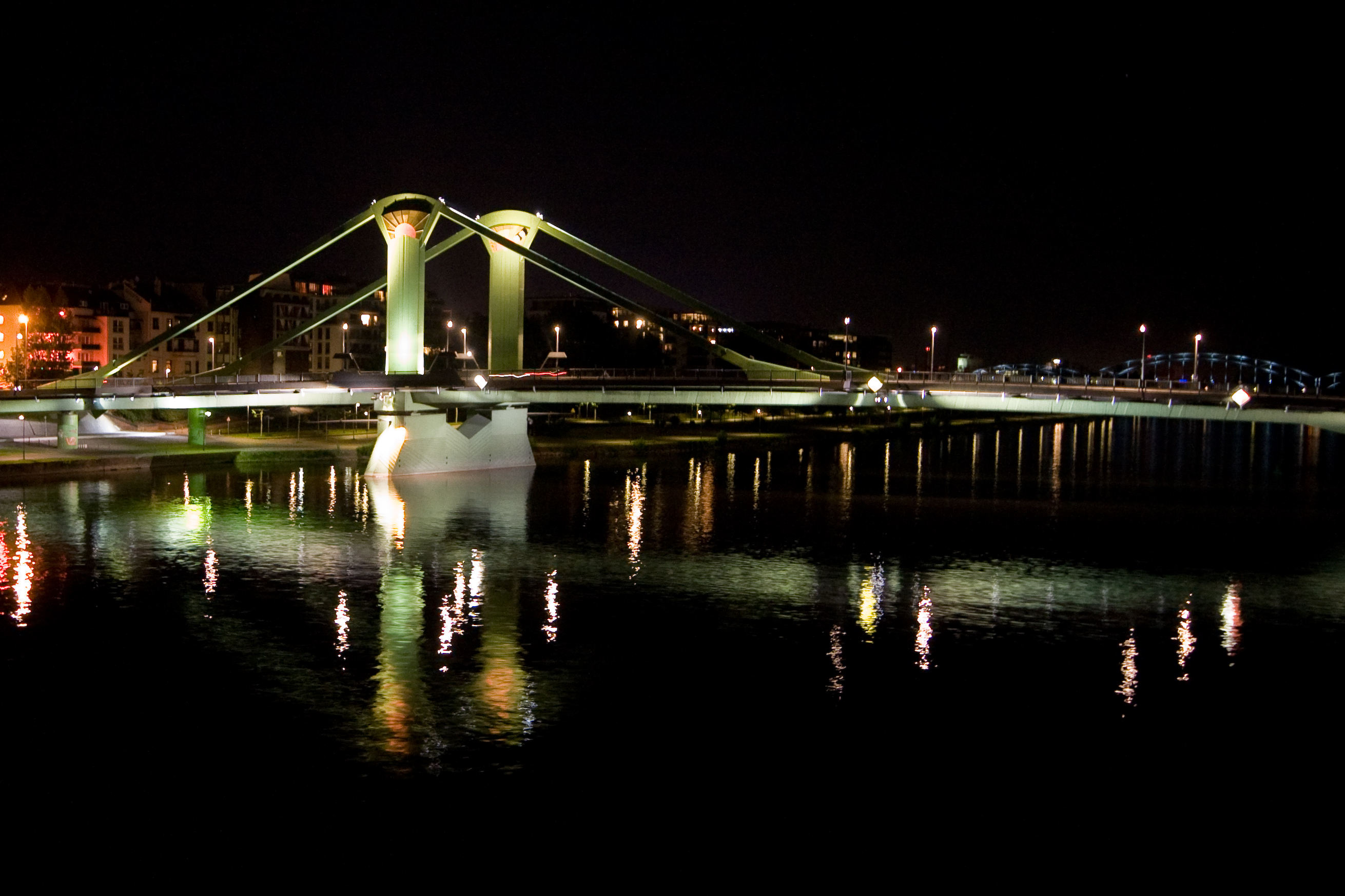 Flösserbrücke, Frankfurt am Main, Germany